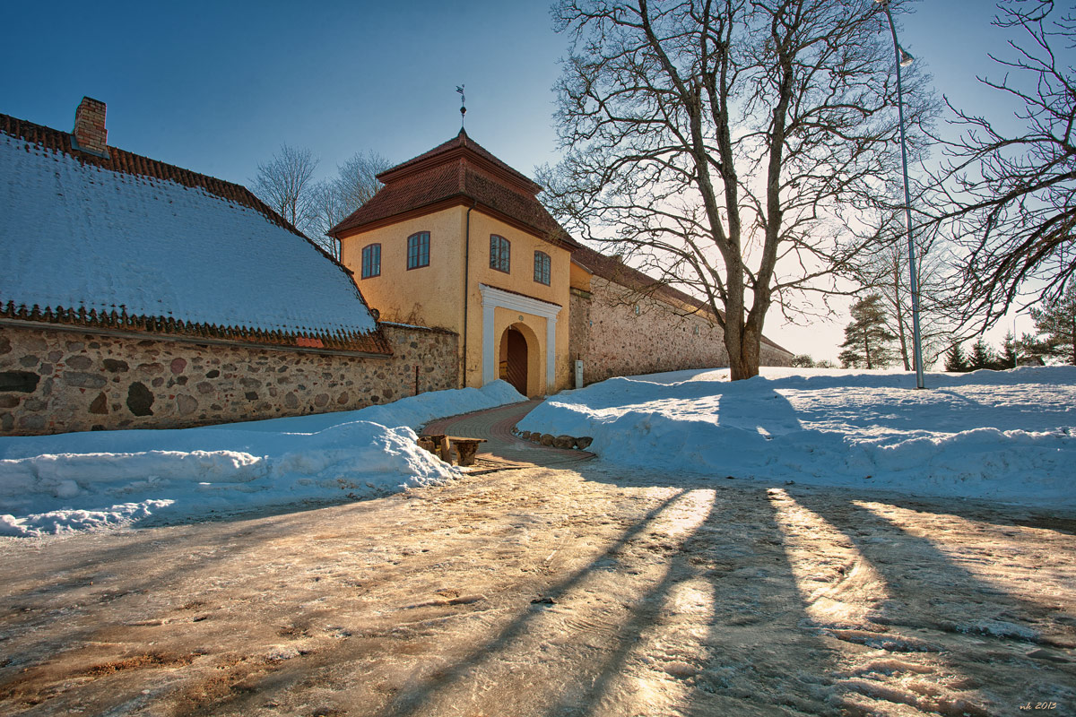 Šlokenbekas viduslaiku pils, Smārde